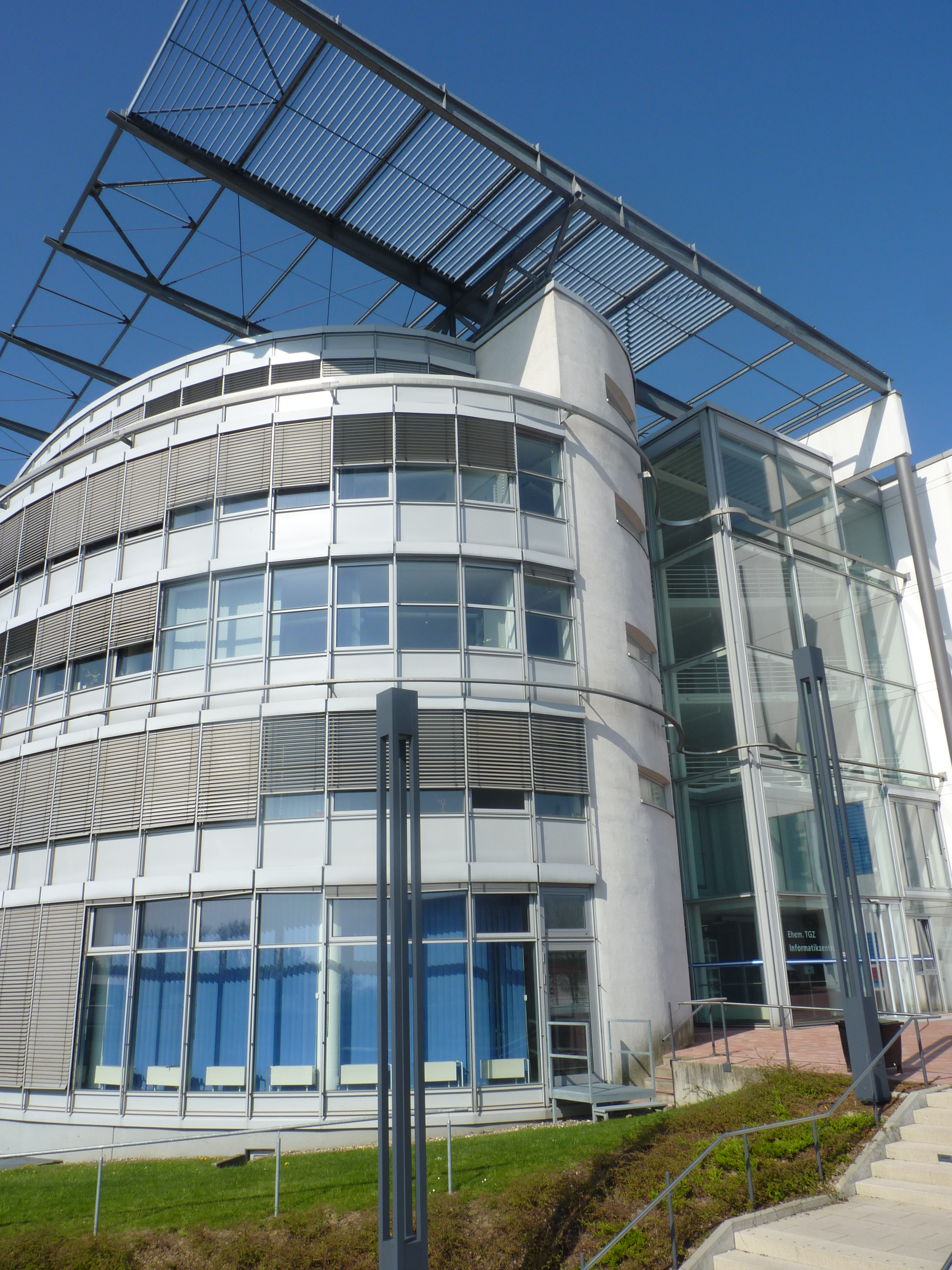 Das Informationszentrum auf dem Campus der Fernuniversität Hagen, welches u.a. auch einen Lagerraum für das Universitätsarchiv bietet